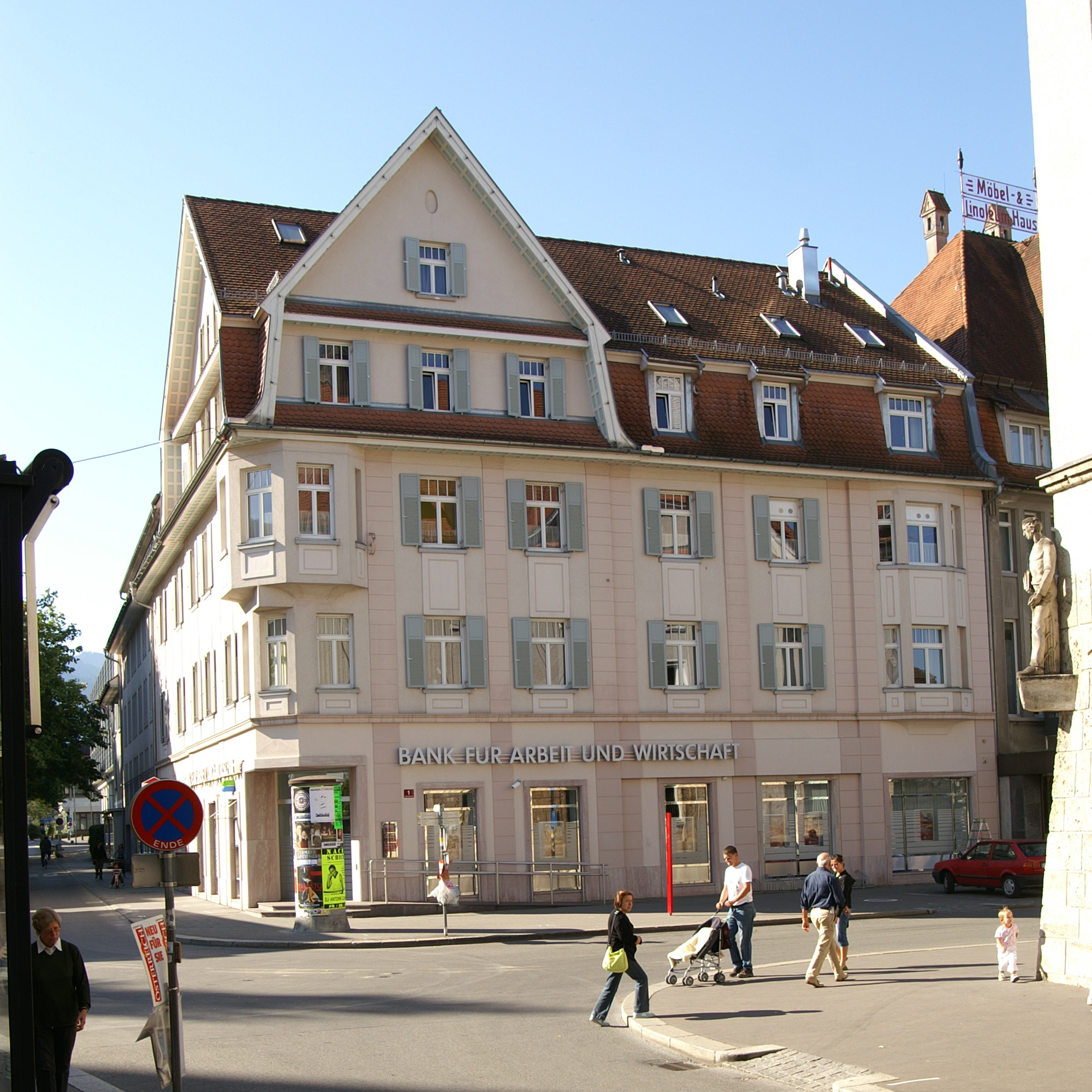 Bahnhofstrasse 1, Bank für Arbeit und Wirtschaft in Dornbirn. Auftraggeber: , . Architekt: Willibald Braun Baujahr 1911/12